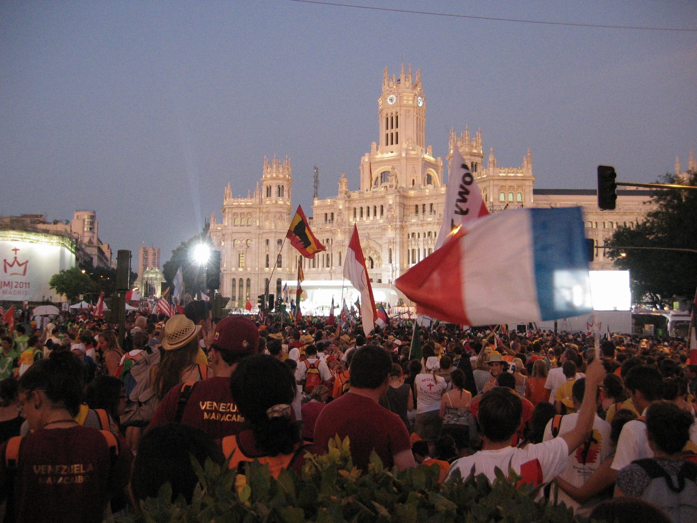 Messe d’ouverture de JMJ 2011 à Madrid.